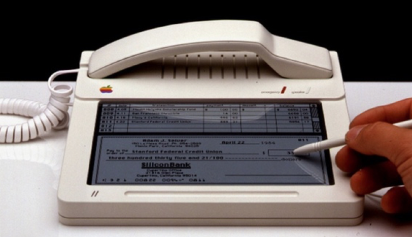 1983ko Apple-ren “MacPhone” telefono prototipoa